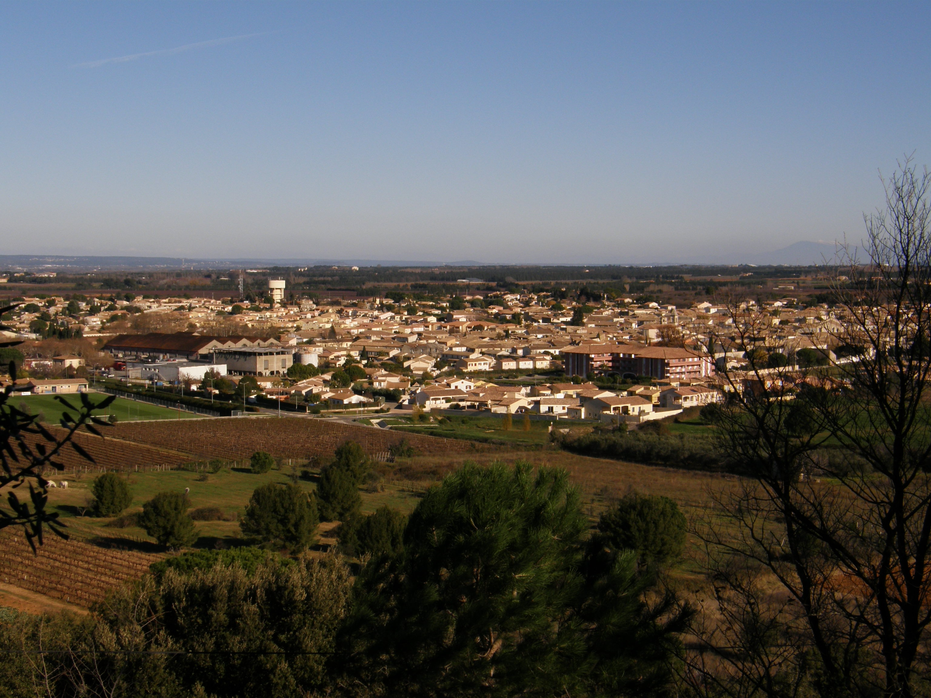 Vue générale du village de Générac (Gard, France)